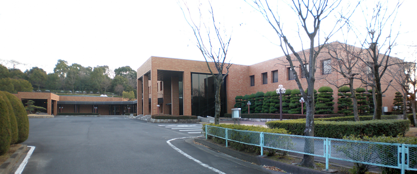 愛知県小牧市にある尾張東部聖苑のパノラマ写真（ソフトウェアで合成）